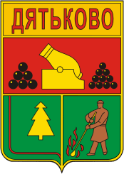 Герб города Дятьково, Брянская область